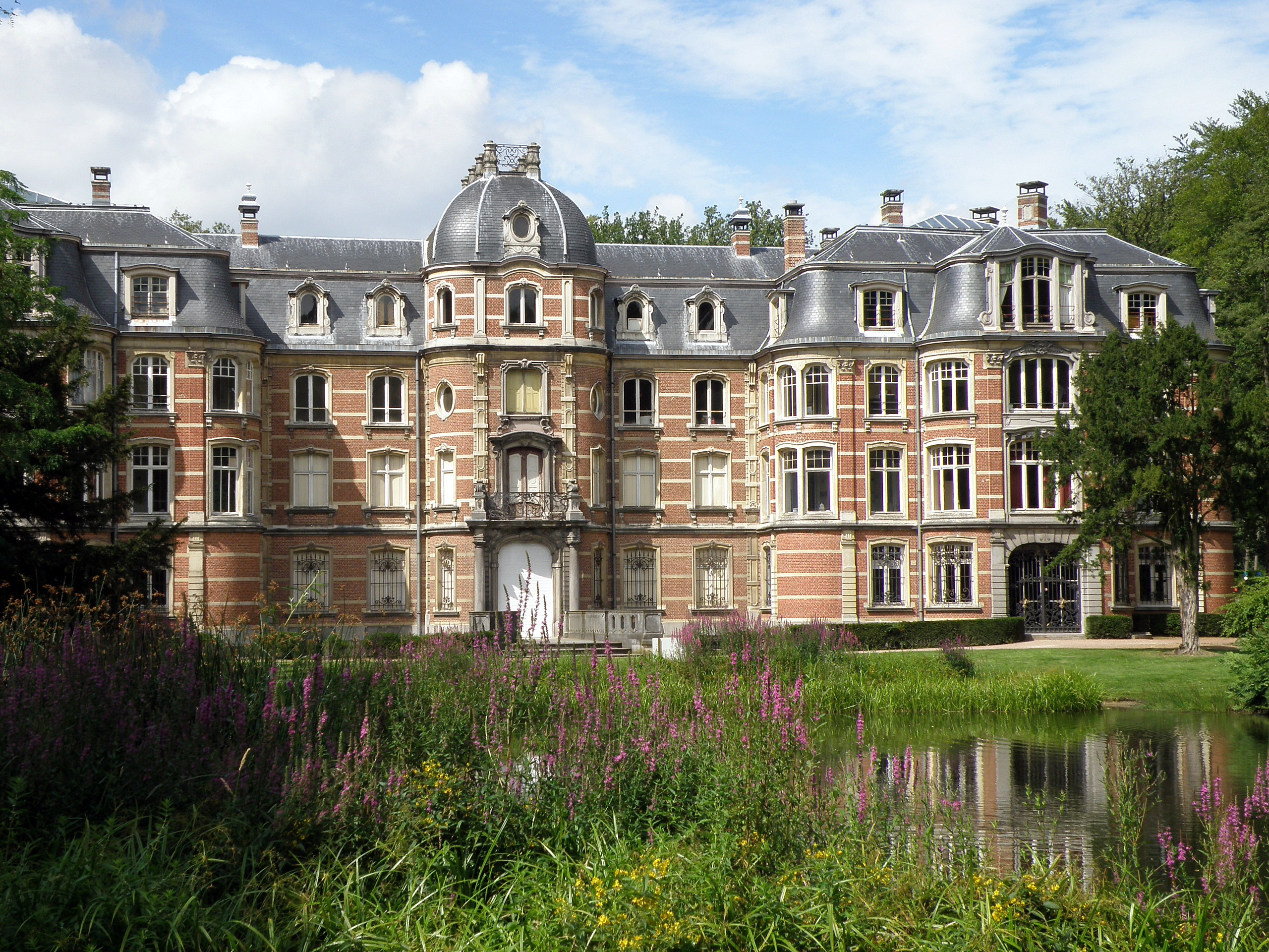 Stabroek, comm. dans la prov. d'Anvers (Belgique), à la frontière hollandaise. Château Ravenhof, de style néo-rococo, édifié pour partie début XIXe, pour partie début XXe. Arch. Fr. Stuyck. Parc s'étendant de part et d'autre de la frontière. Gloriette en territoire hollandais. Sur la photo: façade sud (arrière, côté jardin).